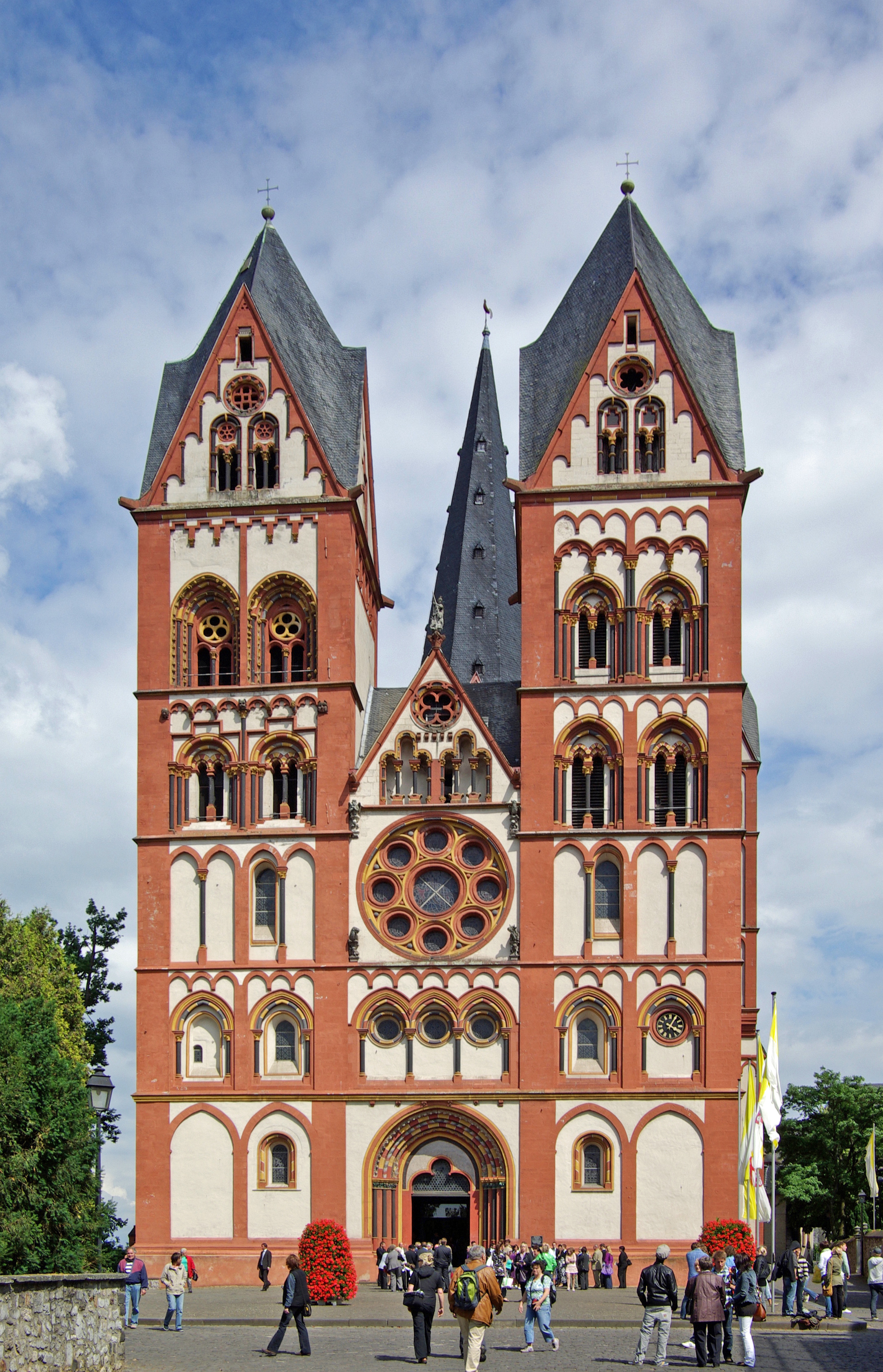 Limburg an der Lahn, Dom, Westfassade